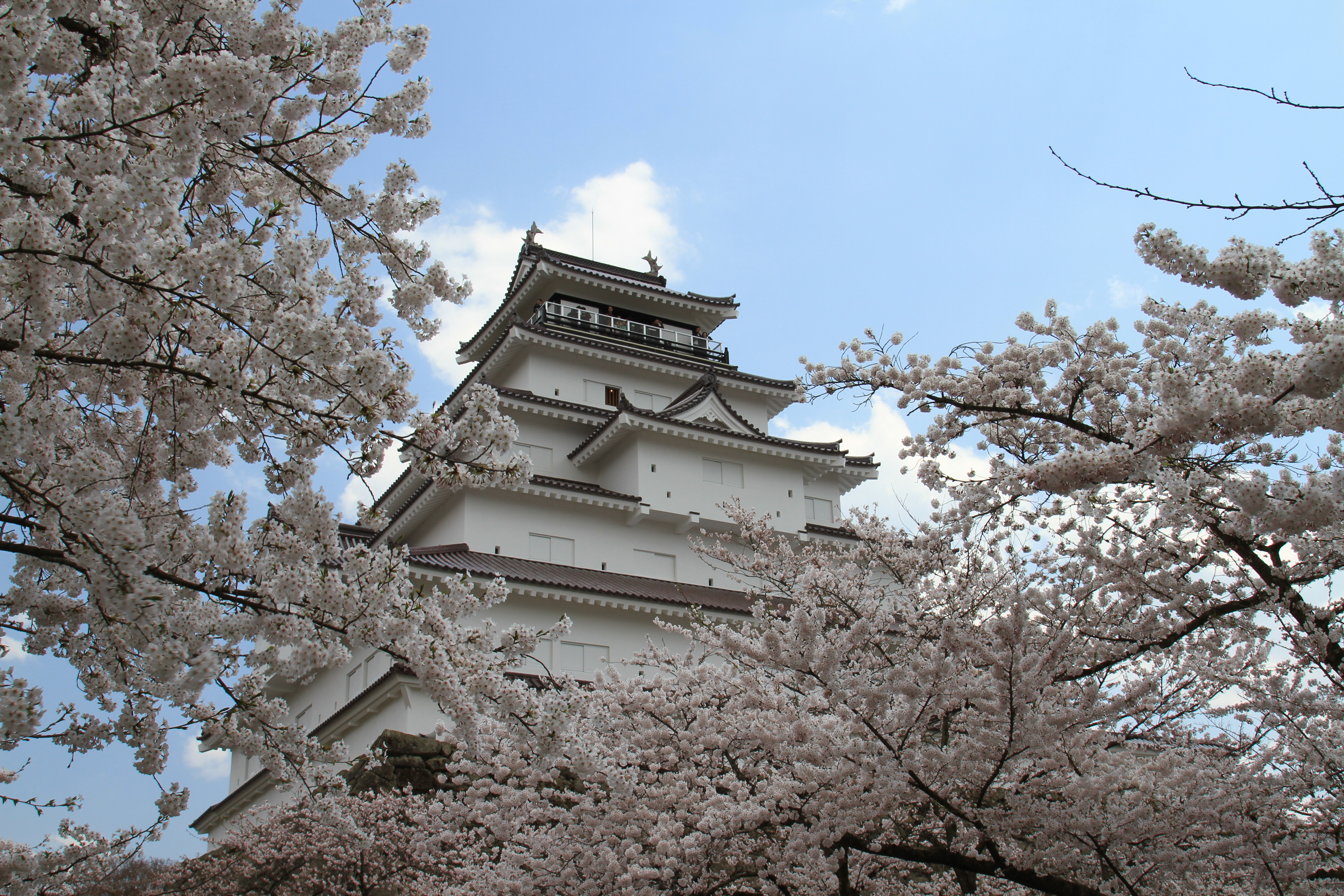 1 Ōtemachi, Aizuwakamatsu-shi, Fukushima-ken 965-0873, Japan